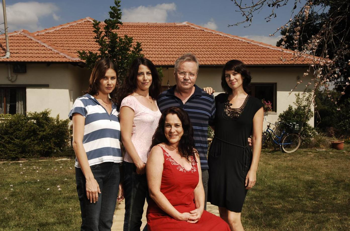 צוות שחקני סדרת הטלוויזיה מגדלים באוויר